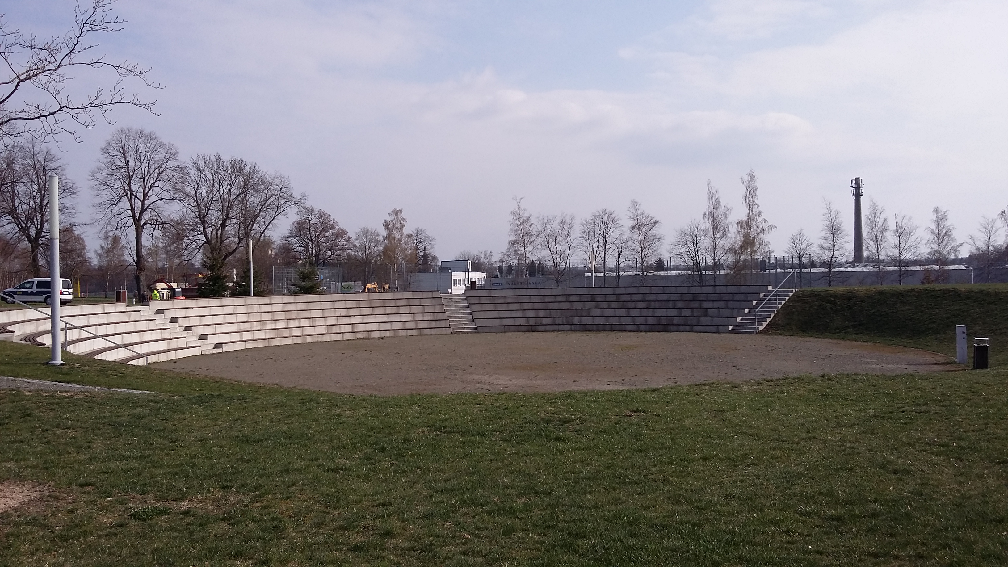 Amfiteátr, rekreační areál Pilák, Pilská vodní nádrž, Žďár nad Sázavou.